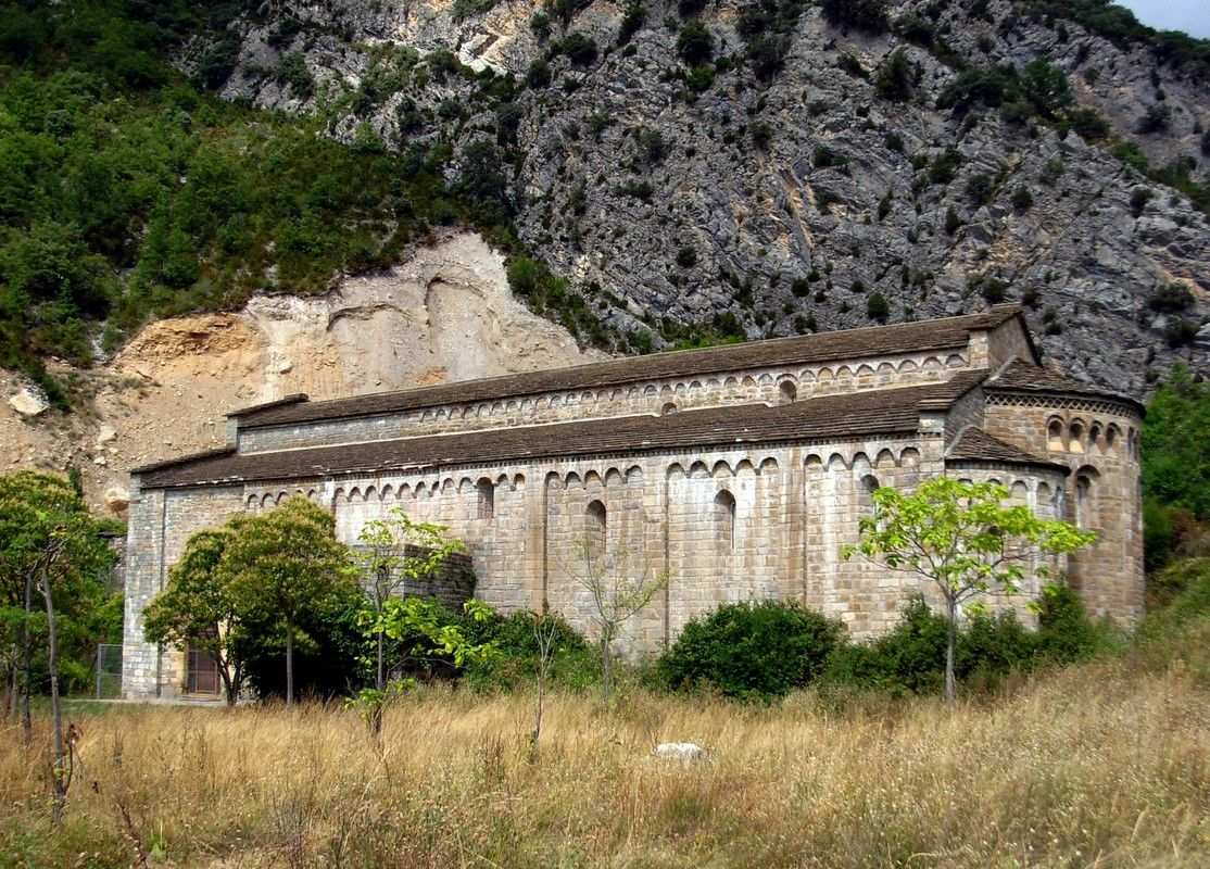 Monestir de Santa Maria d'Obarra (Baixa Ribagorça), Osca